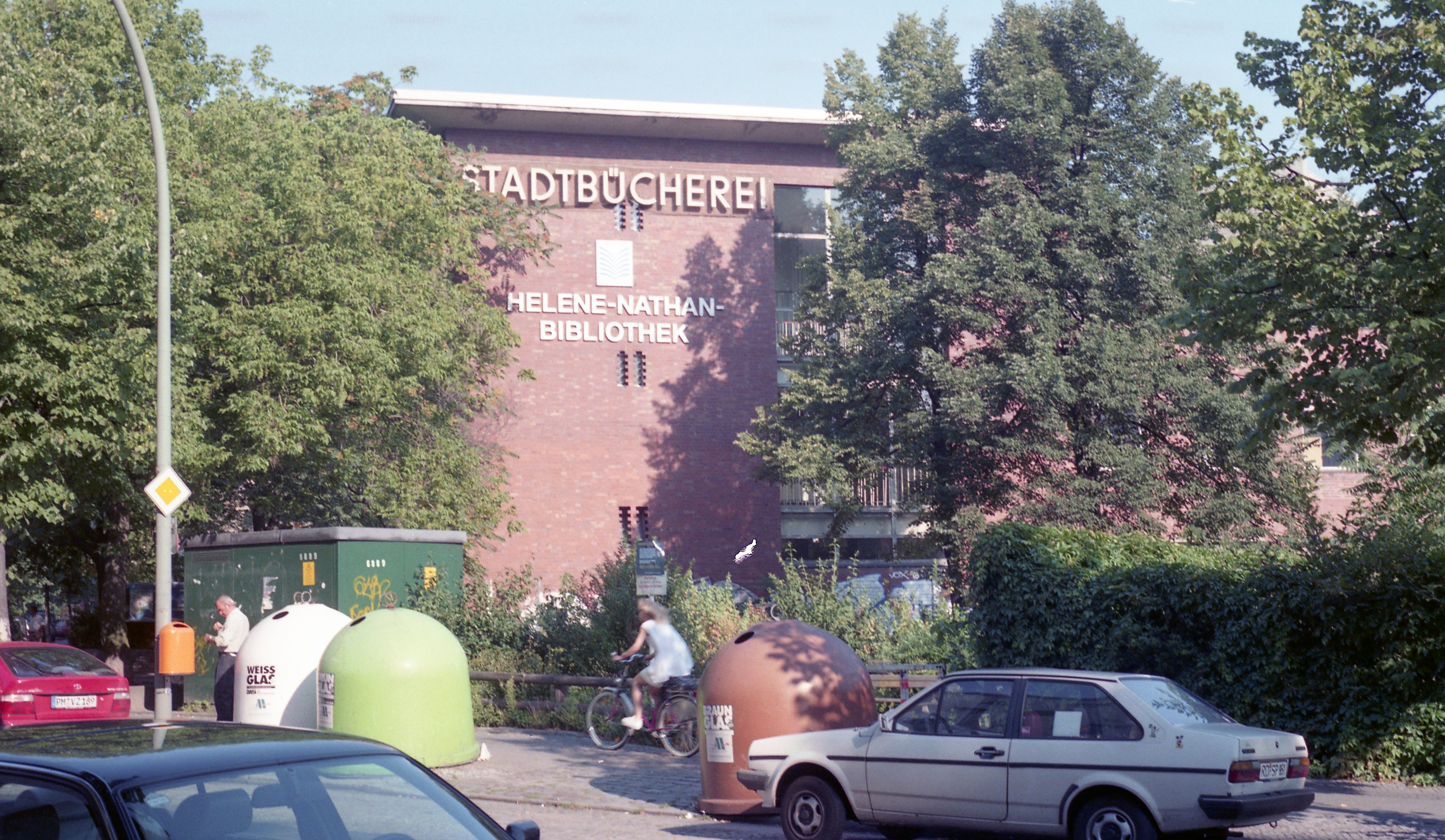 ehemalige Helene-Nathan-Bibliothek in der Erlanger Straße in Berlin-Neukölln